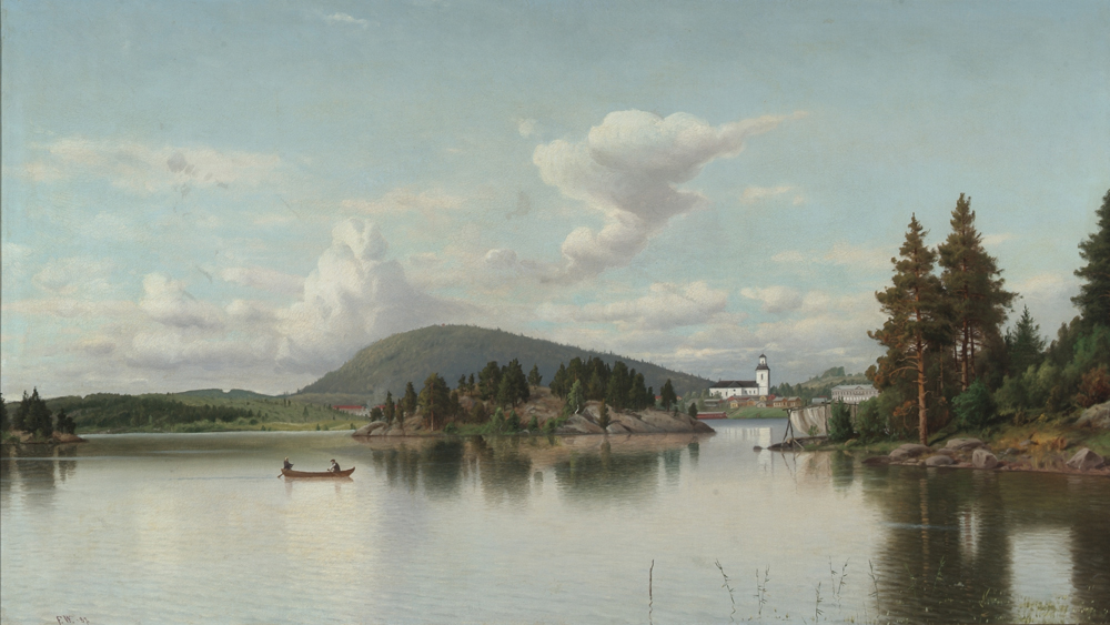 Fridolf Weurlander: "Maisema Kuopiosta", 1887. Kuopion taidemuseo.